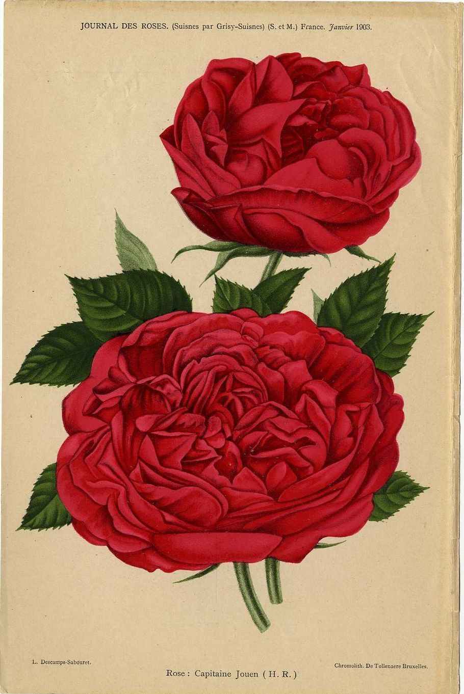 Rose hybride remontant 'Capitaine Jouen' (Philbert Boutigny 1900), in Journal des roses, janvier 1903.